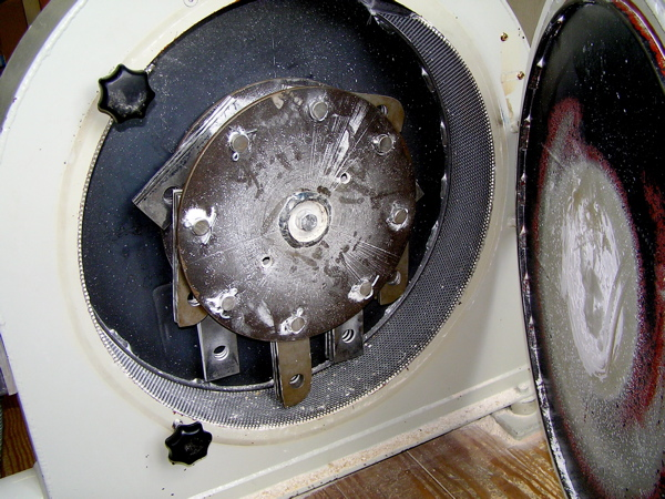 Hammermühle, Hammermill